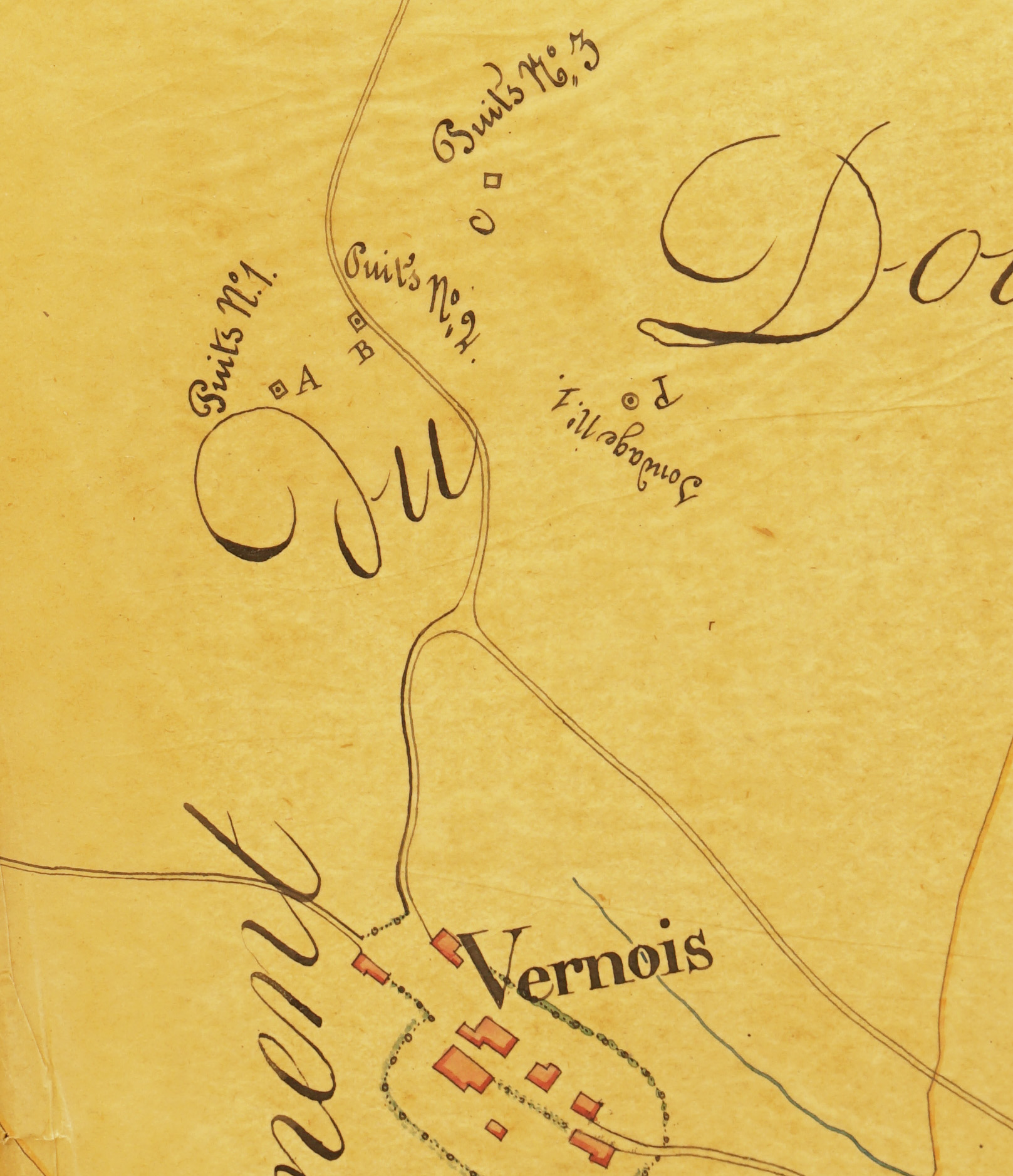 Les trois puits de mine en activité aux houillère de Le Venoy.